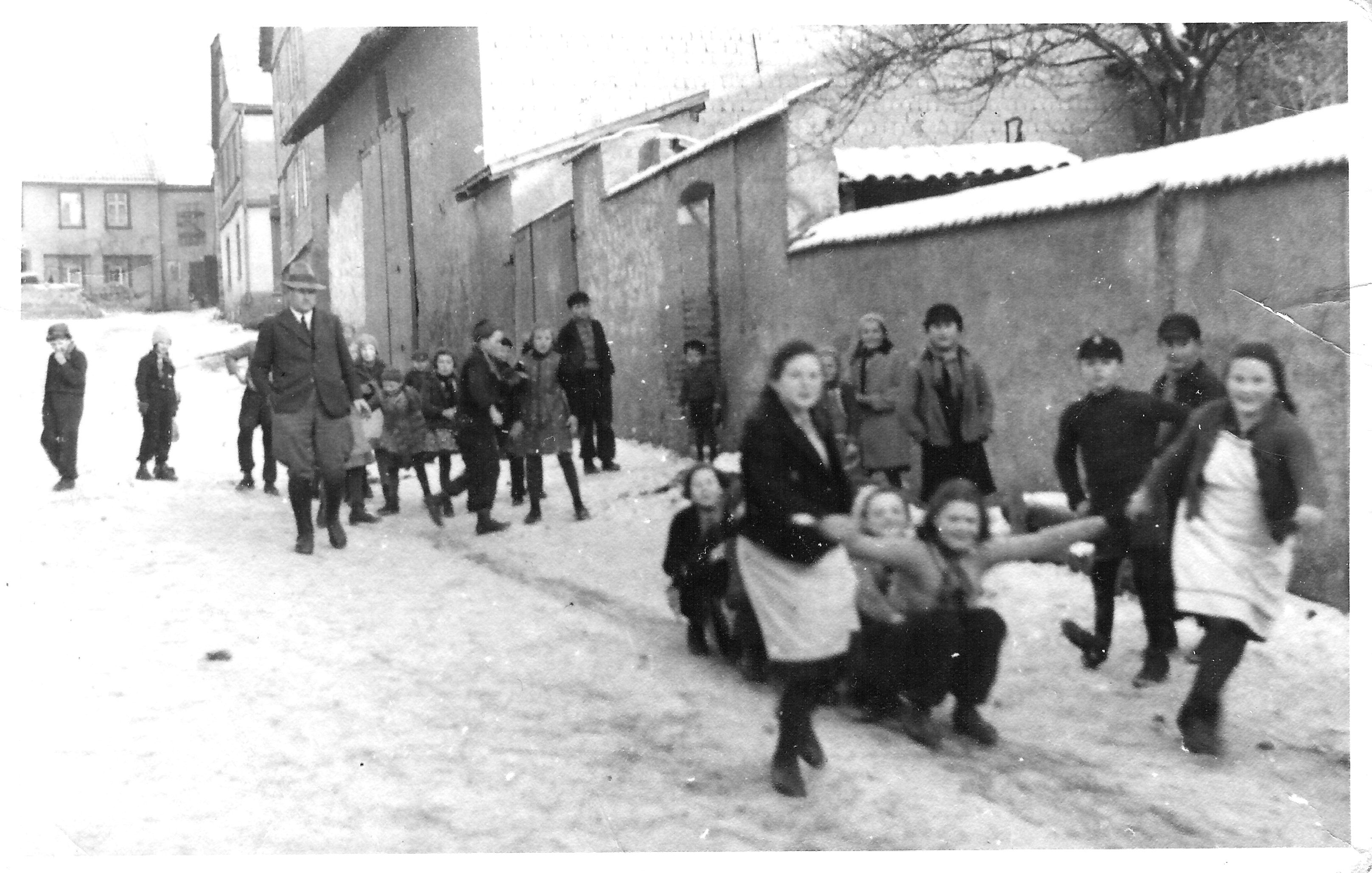 Ansicht der Genheimer Dorfstraße mit Kindergärtnerinnen und Kindergartenkindern beim Schlittenfahren.